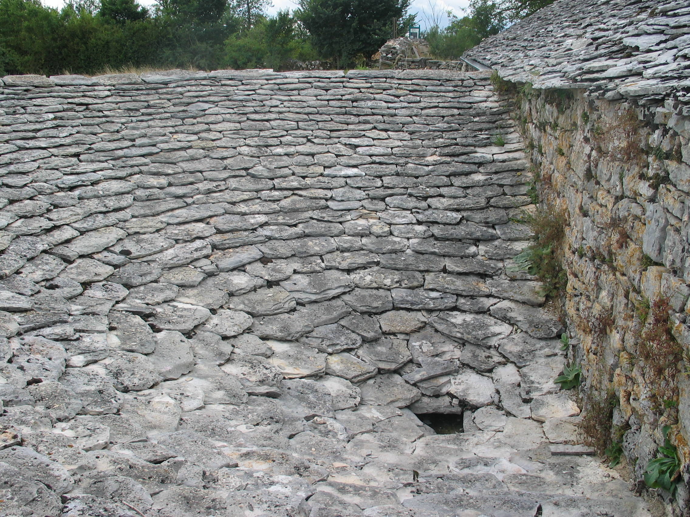 Toit-citerne couvert de lauzes (pierres plates) à Montredon sur le Larzac